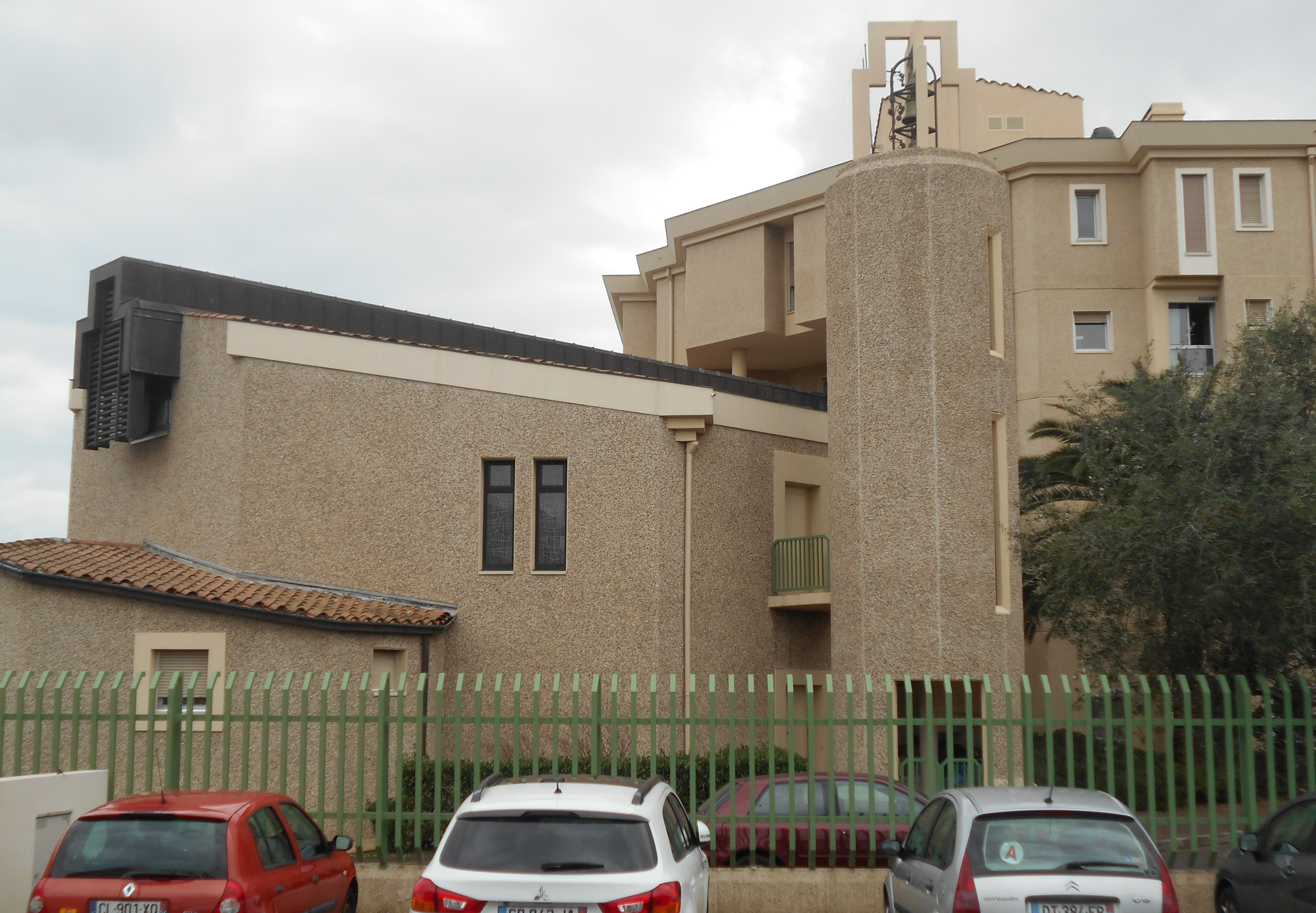 La capella de la residència d'avis de Casa Meva (Ma Maison) de Perpinyà